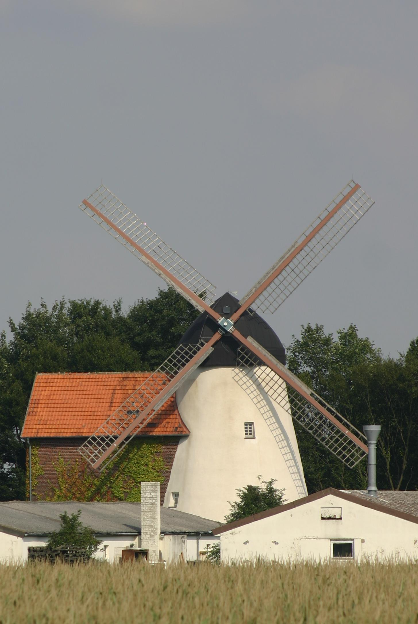 Die Windmühle in Heintrop, Lippetal. This is a photograph of an architectural monument.